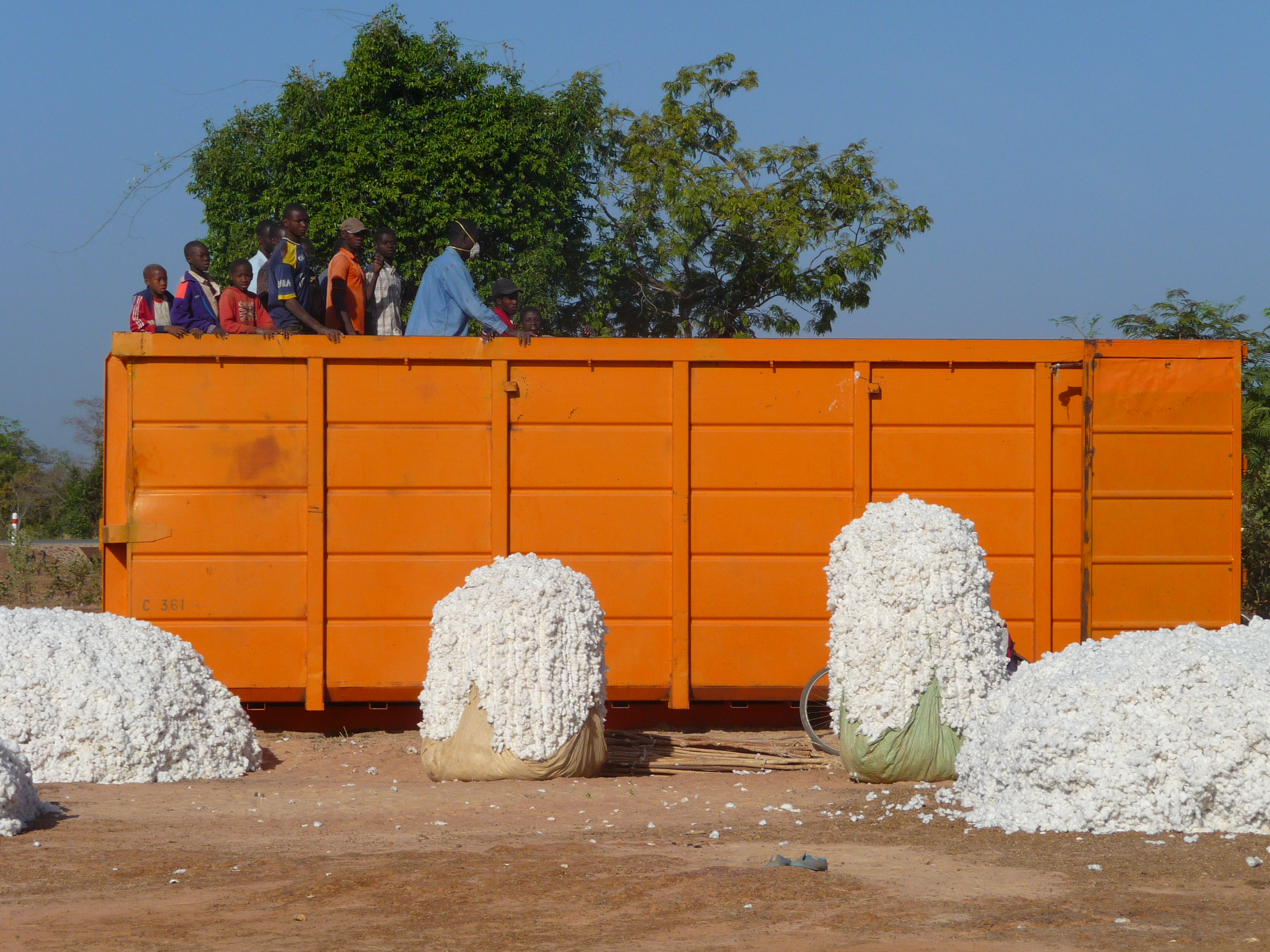 Le coton est l'or blanc au Burkina et sa récolte est une fête intergénérationnelle. Les containers partiront à Abidjan avant de rejoindre les usines qui le transforment, loin des champs de production et de ceux qui le récoltent. This is an image with the theme "Africa on the Move or Transport" from: Burkina Faso